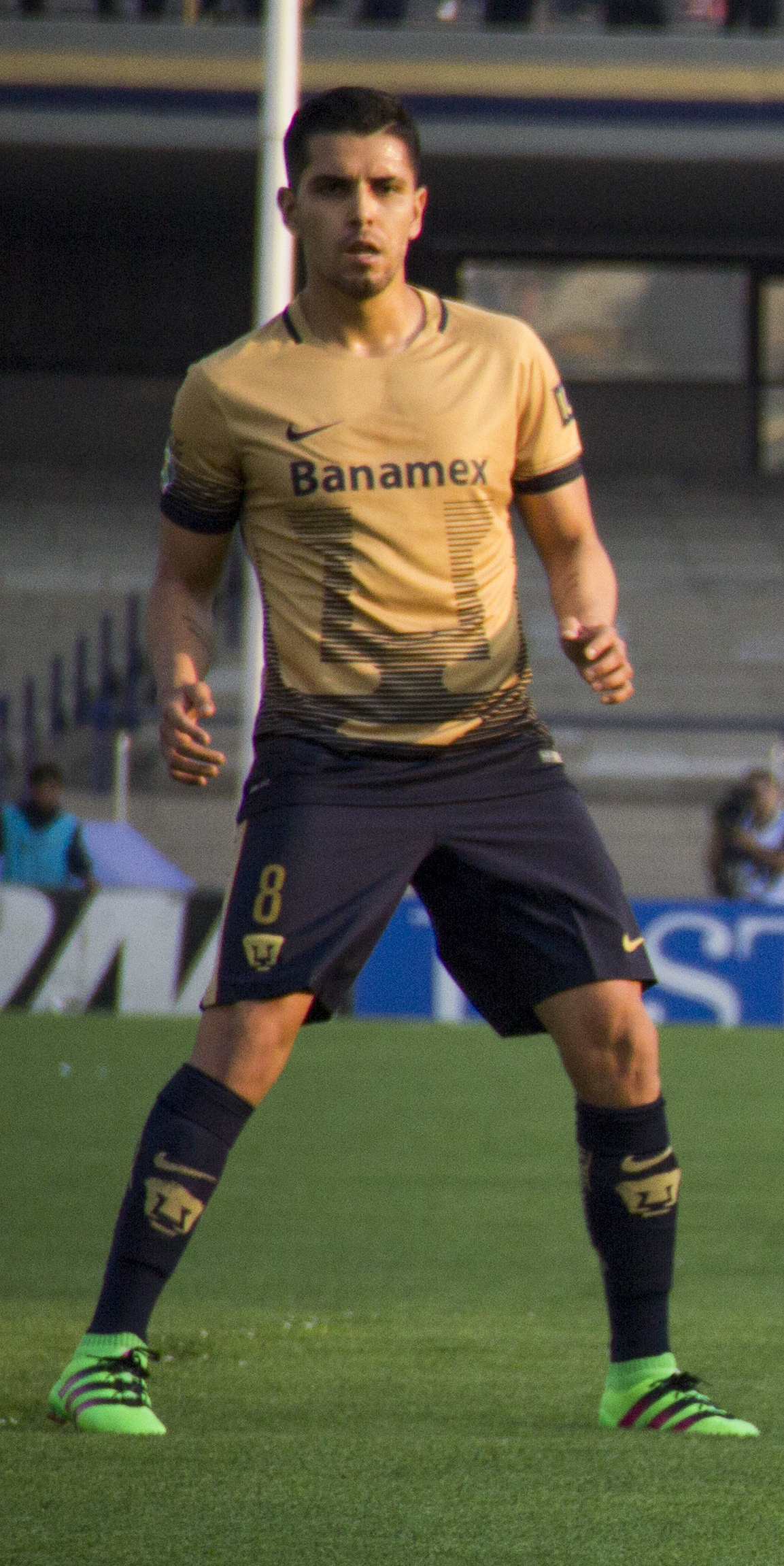 Pumas vs León